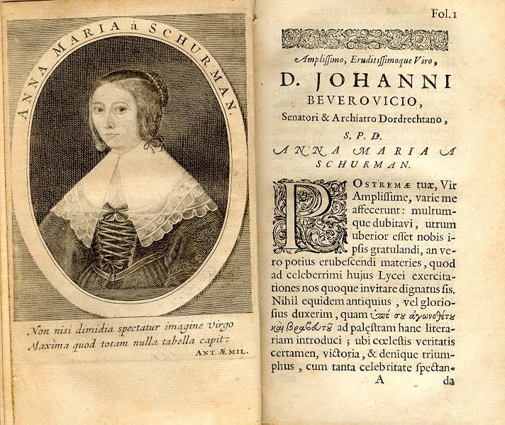 Doppelseite aus "Opuscula Hebraea, Graeca, Latina, Gallica, Prosaica et Metrica" von Anna Maria Schürmann. Frontispiz mit Porträt.